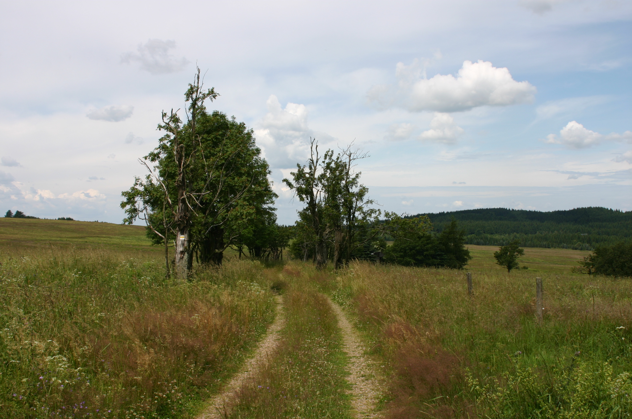 Platz der ehemaligen Gemeinde Grünwald (Pastviny) im Bezirk Teplitz.